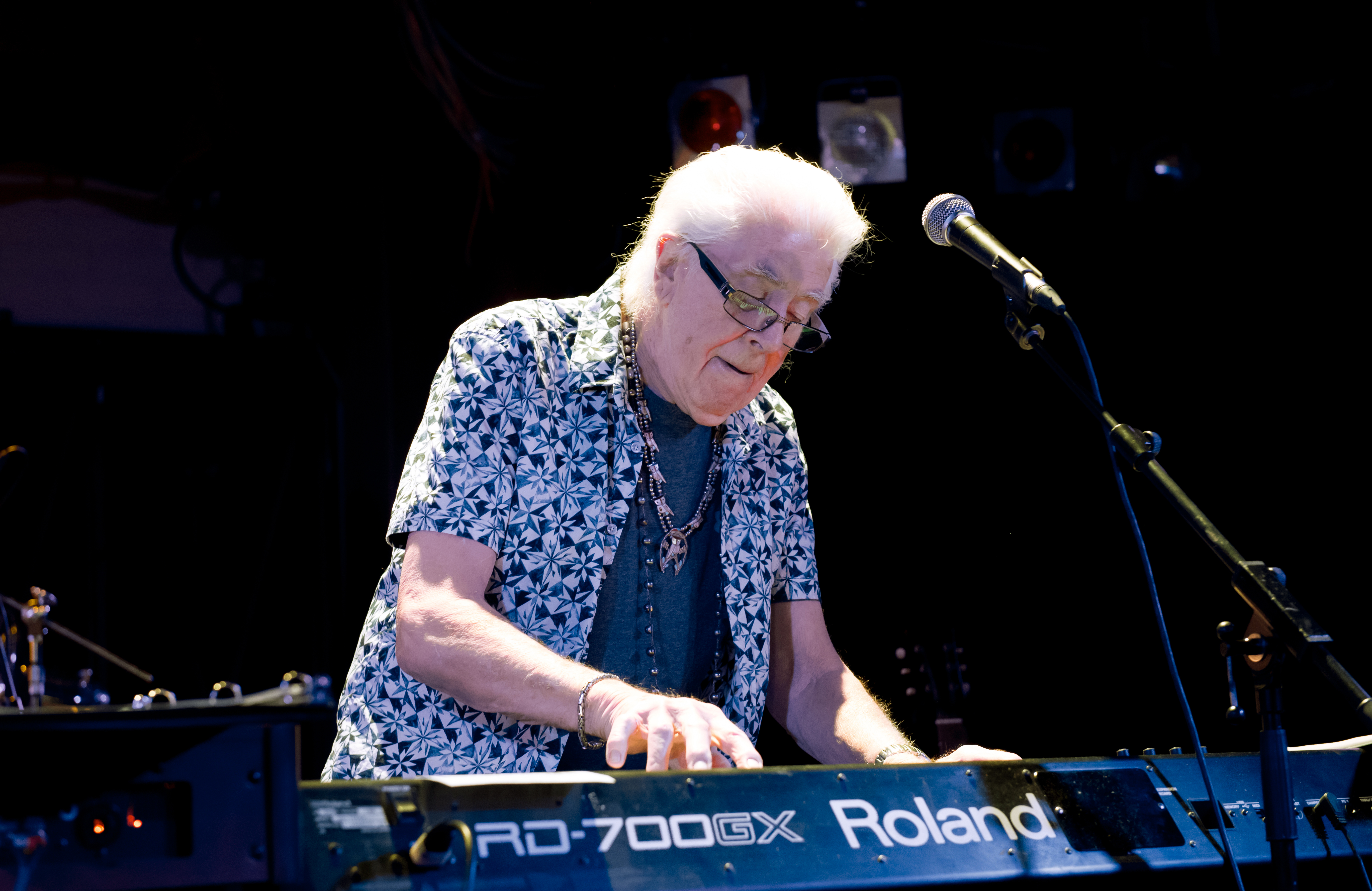 John Mayall in der Fabrik Hamburg 2017